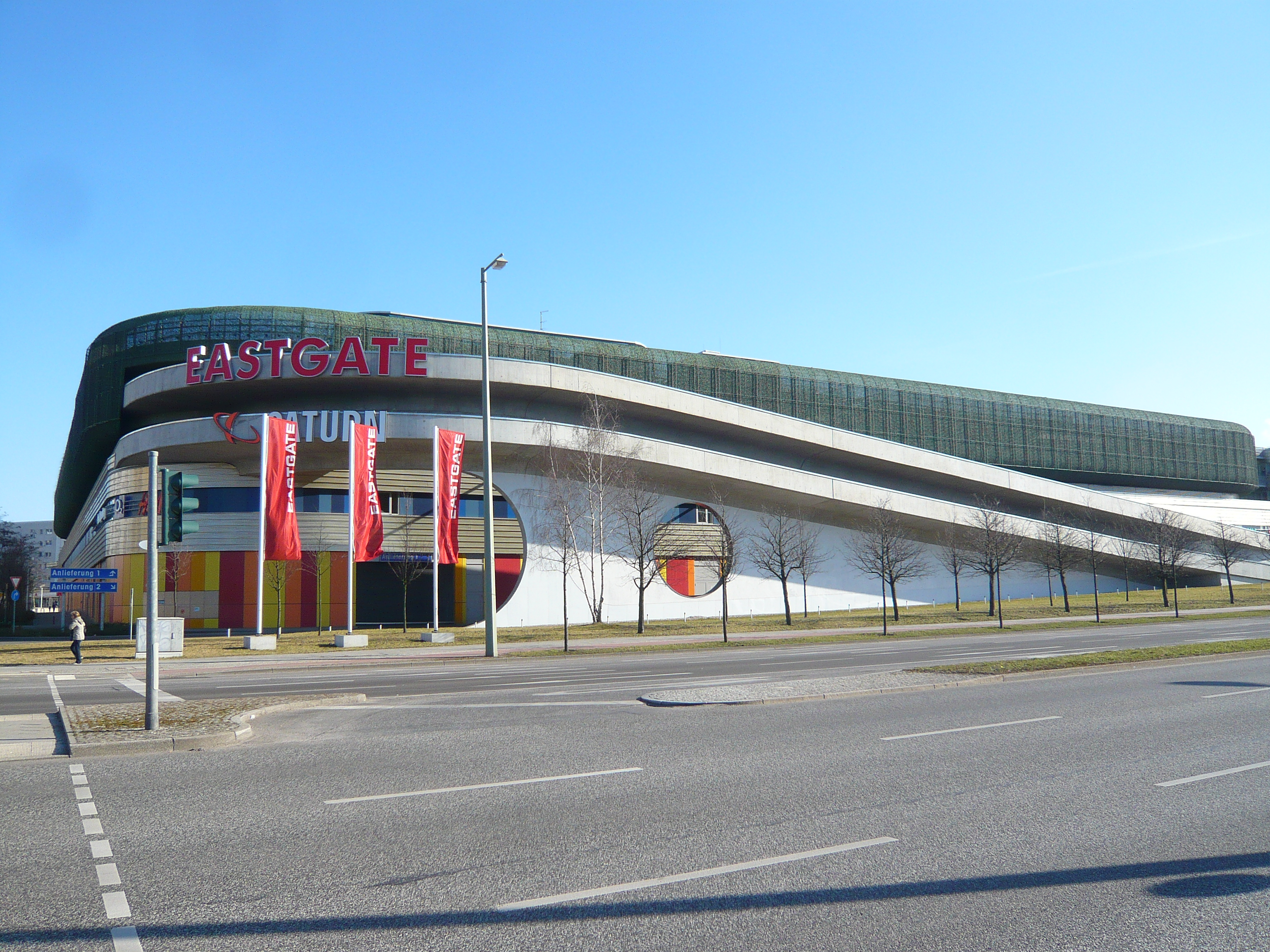 Marzahn, Märkische Allee, Eastgate